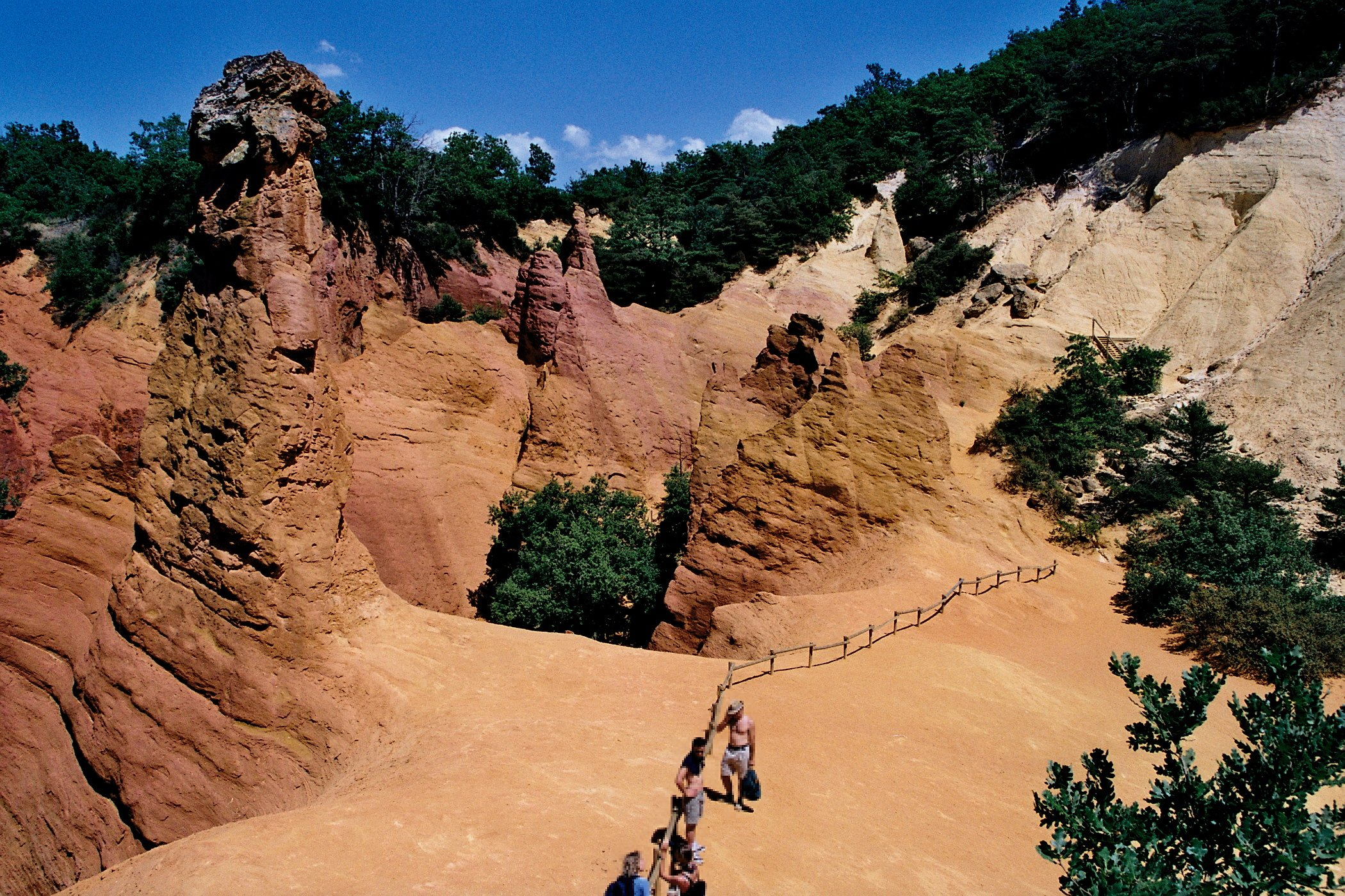 Carrière d'Ocre près de Rustrel en Vaucluse. Aut. : Greudin, été 2003 Lic.